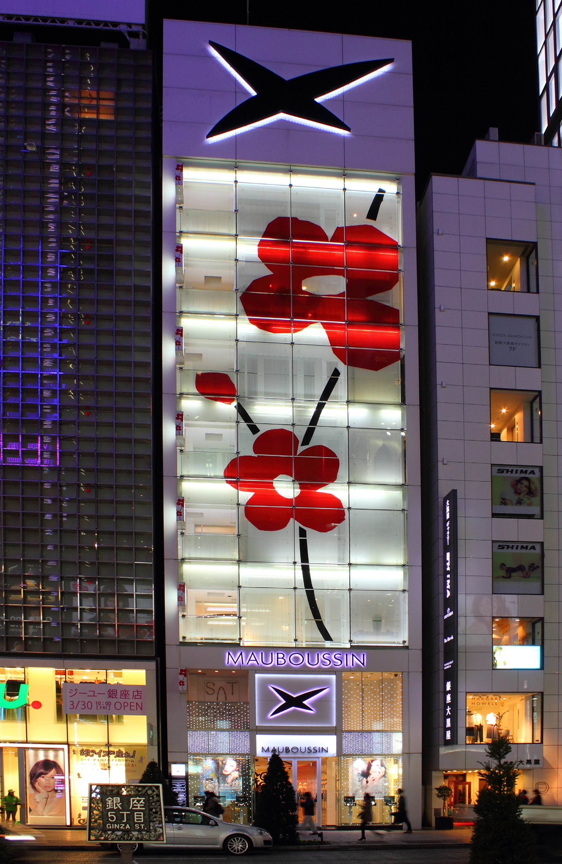 モーブッサン銀座フラッグシップストア